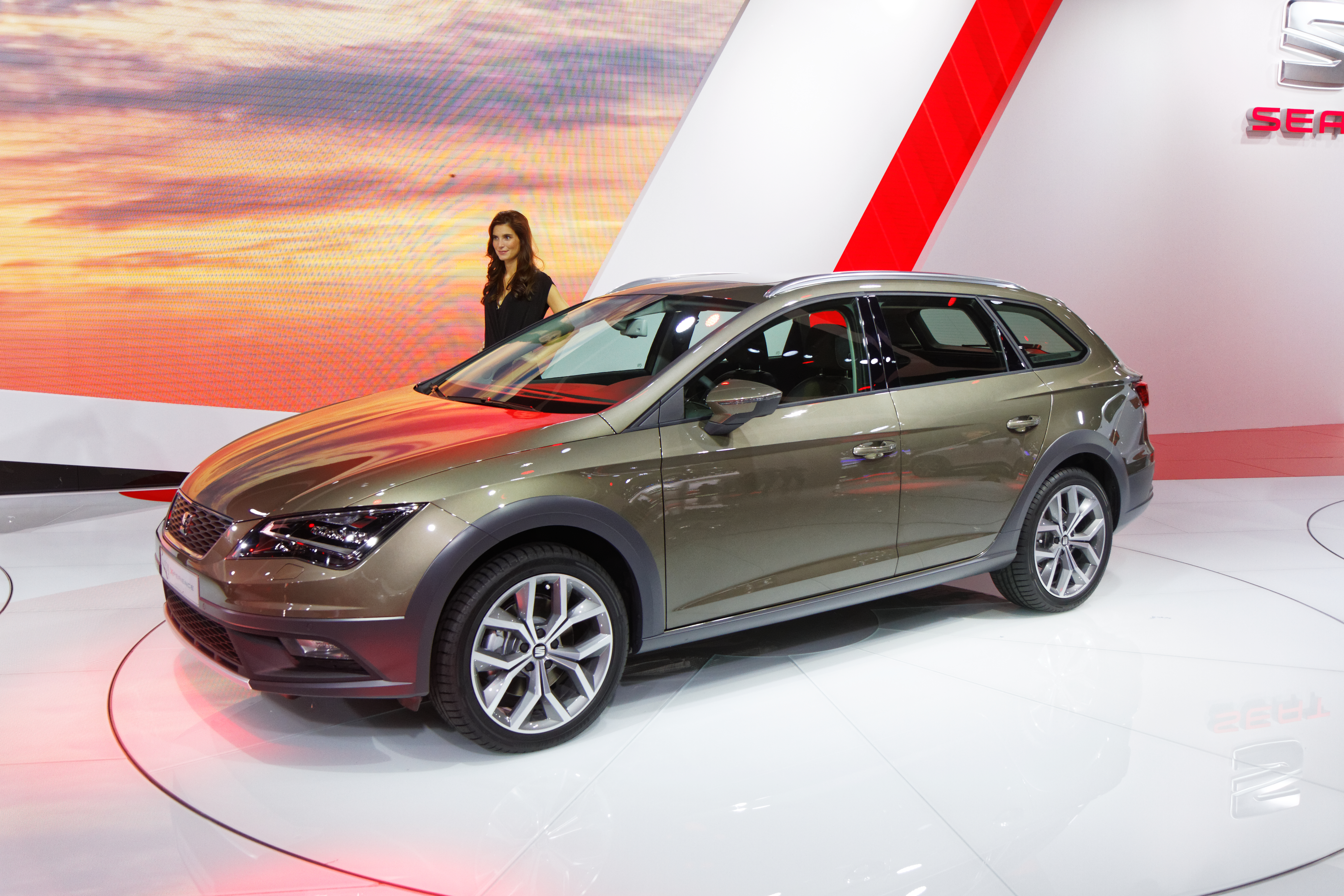 Une Seat Leon Xperience présentée lors du mondial de l'automobile de Paris 2014.